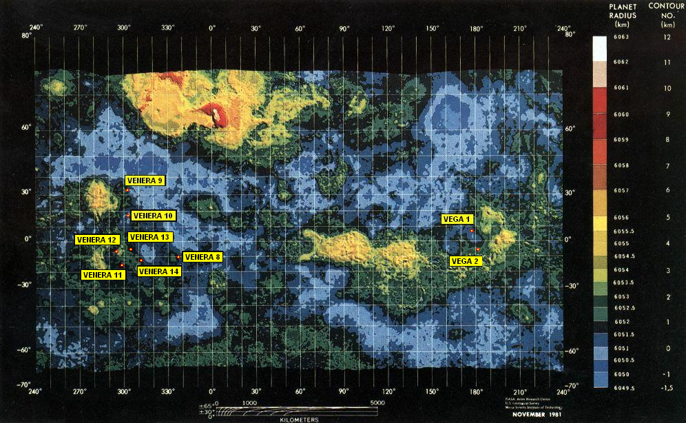 Mapa de Venus con algunas de las sondas soviéticas sobre su superficie. Se puede ampliar con las que faltan. He empleado el mapa de Venus que hay en image:Map of Venus.png. La posición de las sondas es aproximada. Hay un mapa más completo en